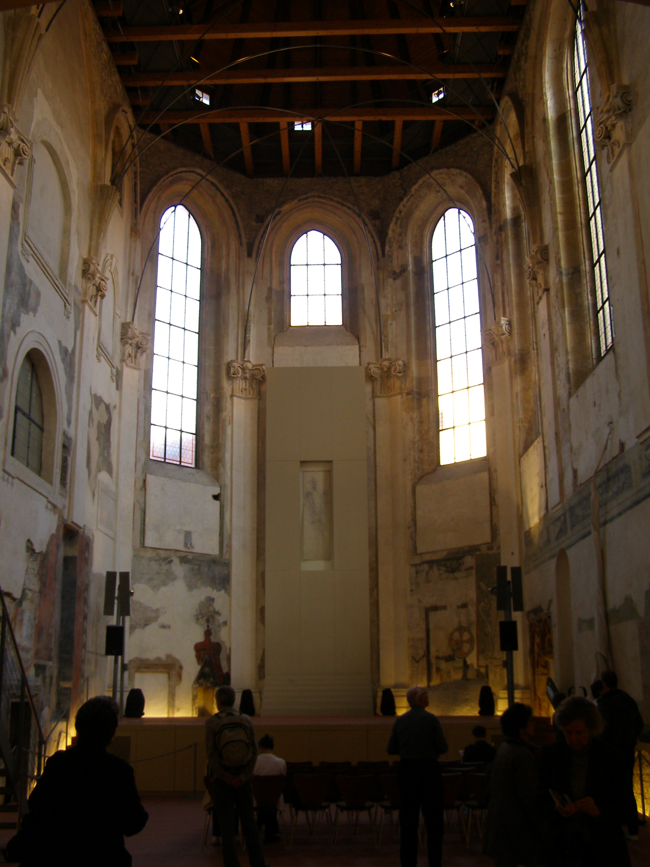 Klášter Annenský (Staré Město), Praha 1, Anenské nám. 211/2, Staré Město